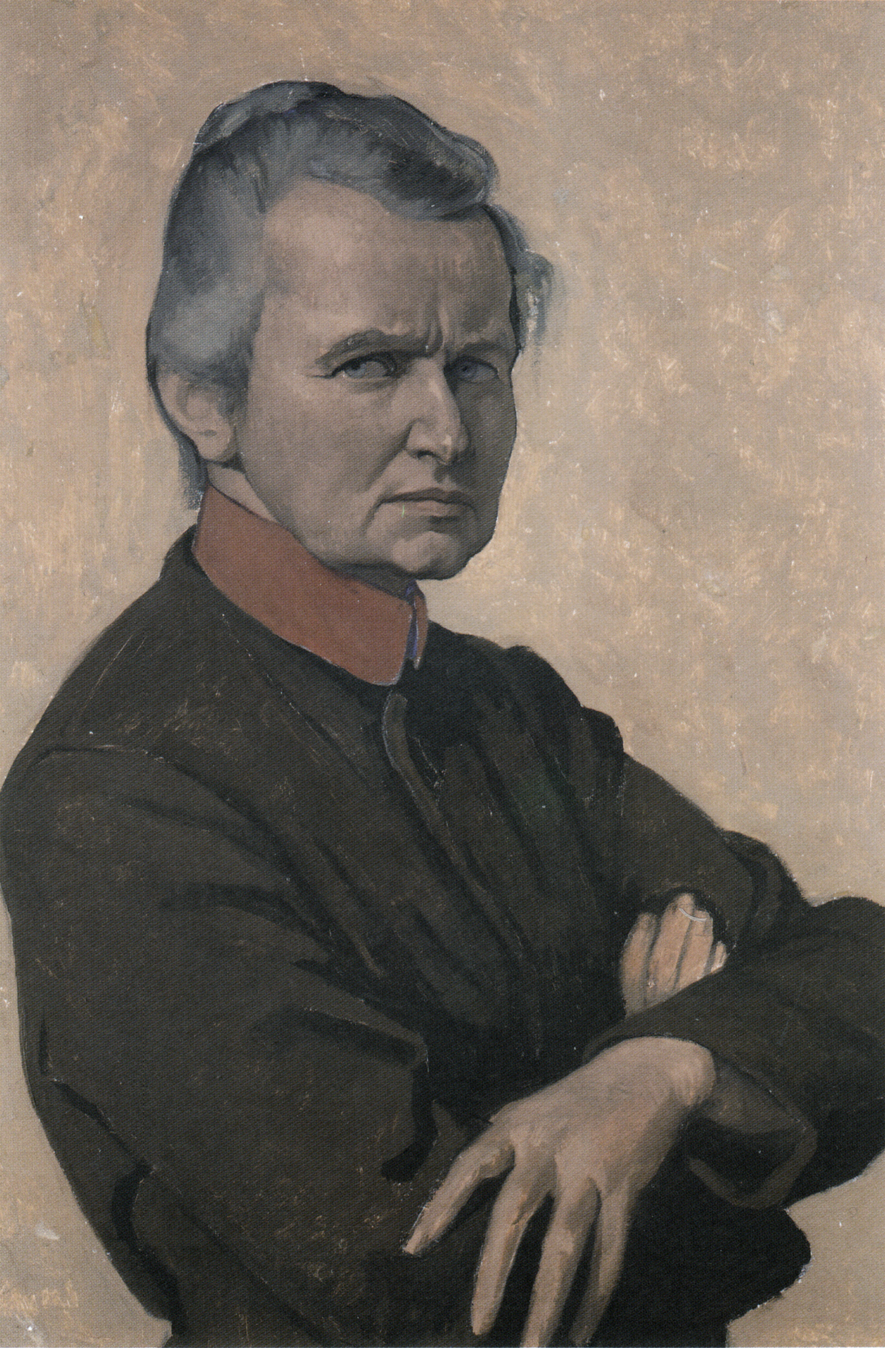 Self-portrait Ottilie W. Roederstein